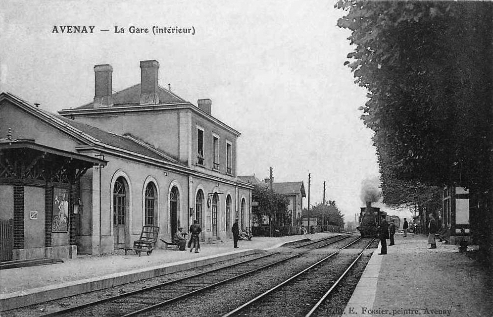 L'intérieur de la gare d'Avenay au début des années 1900